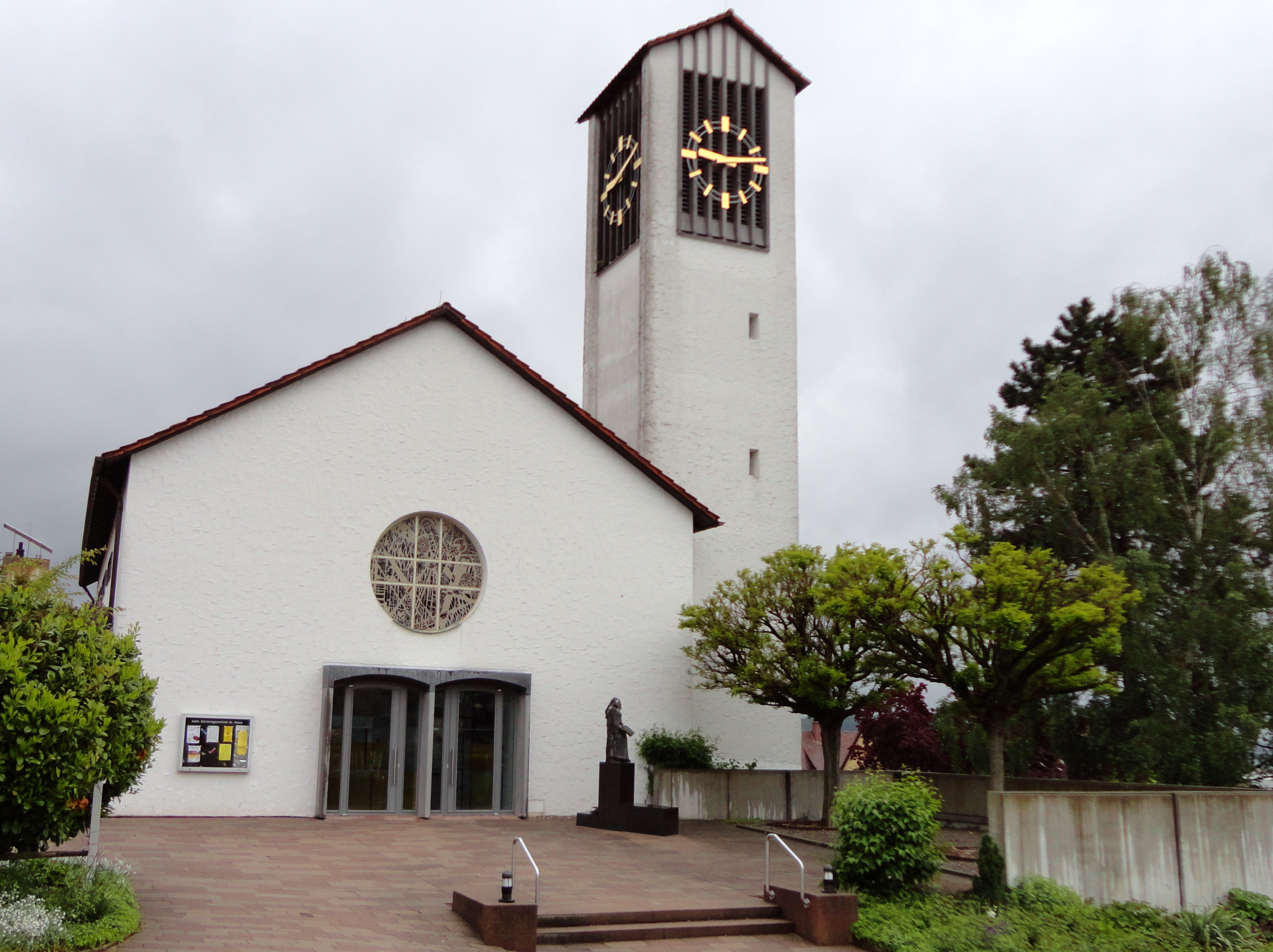 Katholische Kirche St. Klara in Birkenfeld (Würtemberg)